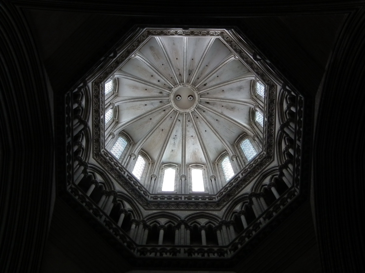 Cathédrale Notre-Dame de Coutances, Coutances, France